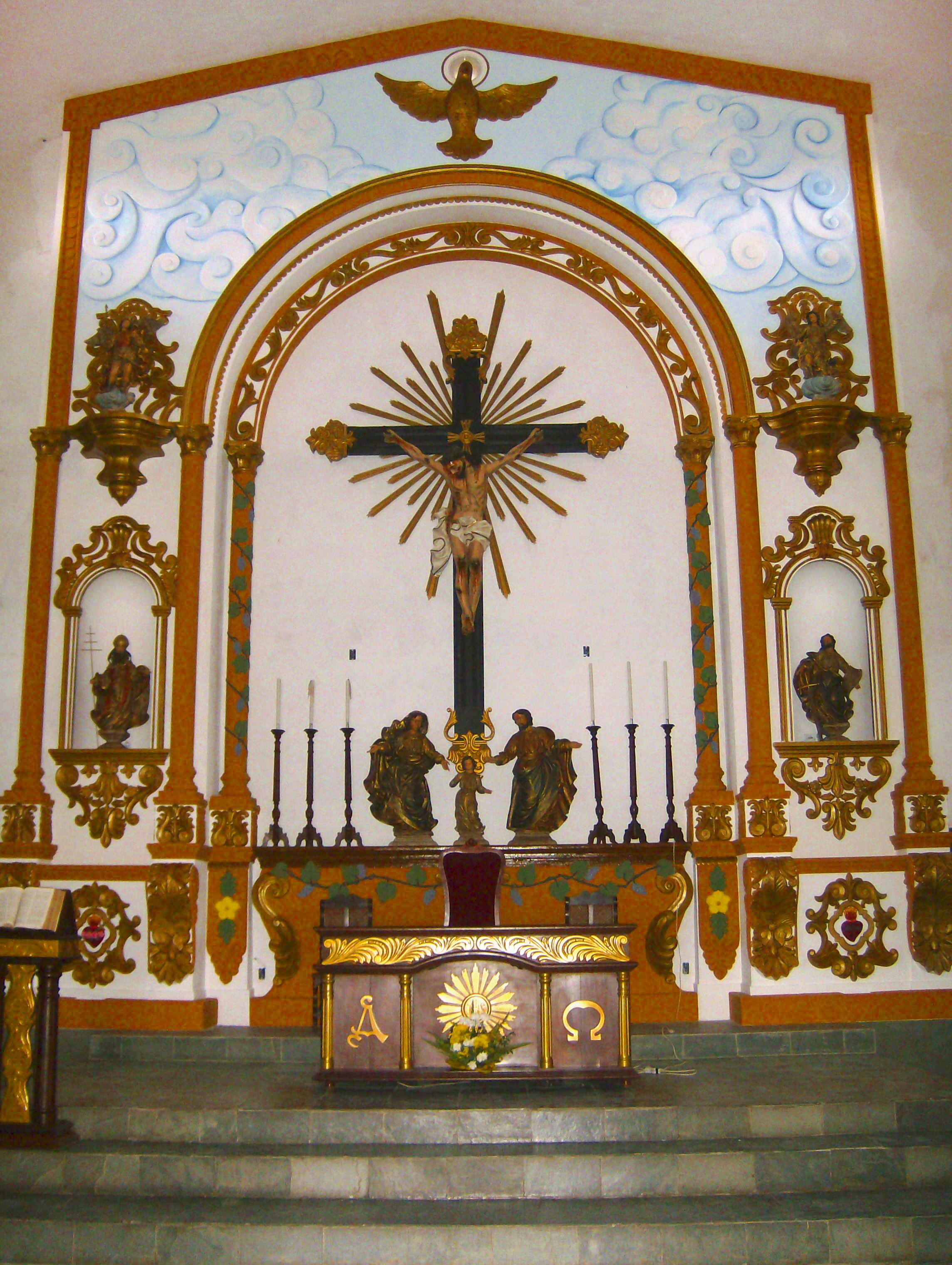 Altar-mor da Igreja Matriz da Sagrada Família em Belém na Paraíba.